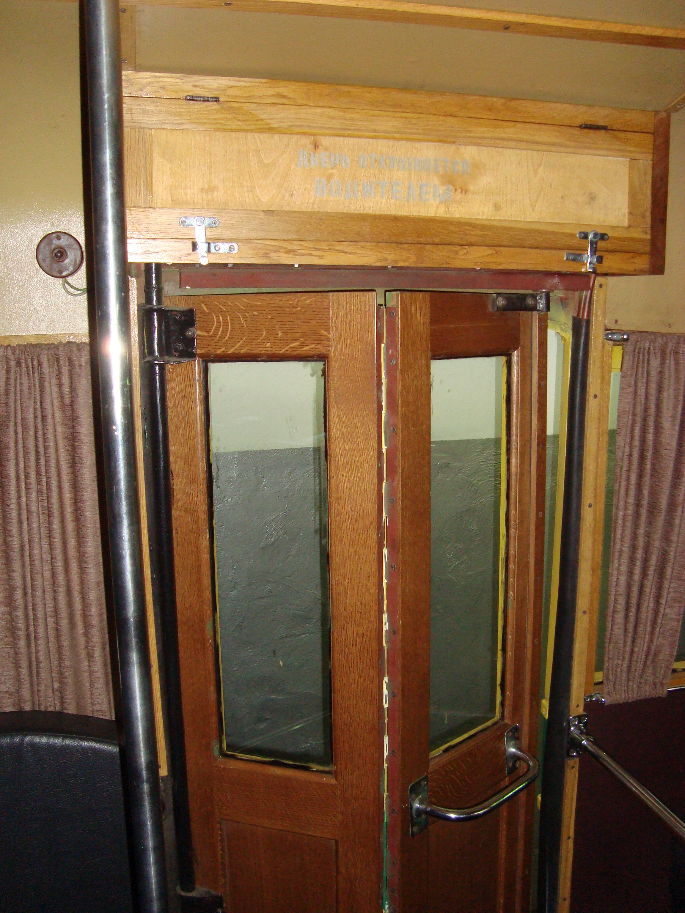 Ширмовая дверь в задней части ЯТБ-1